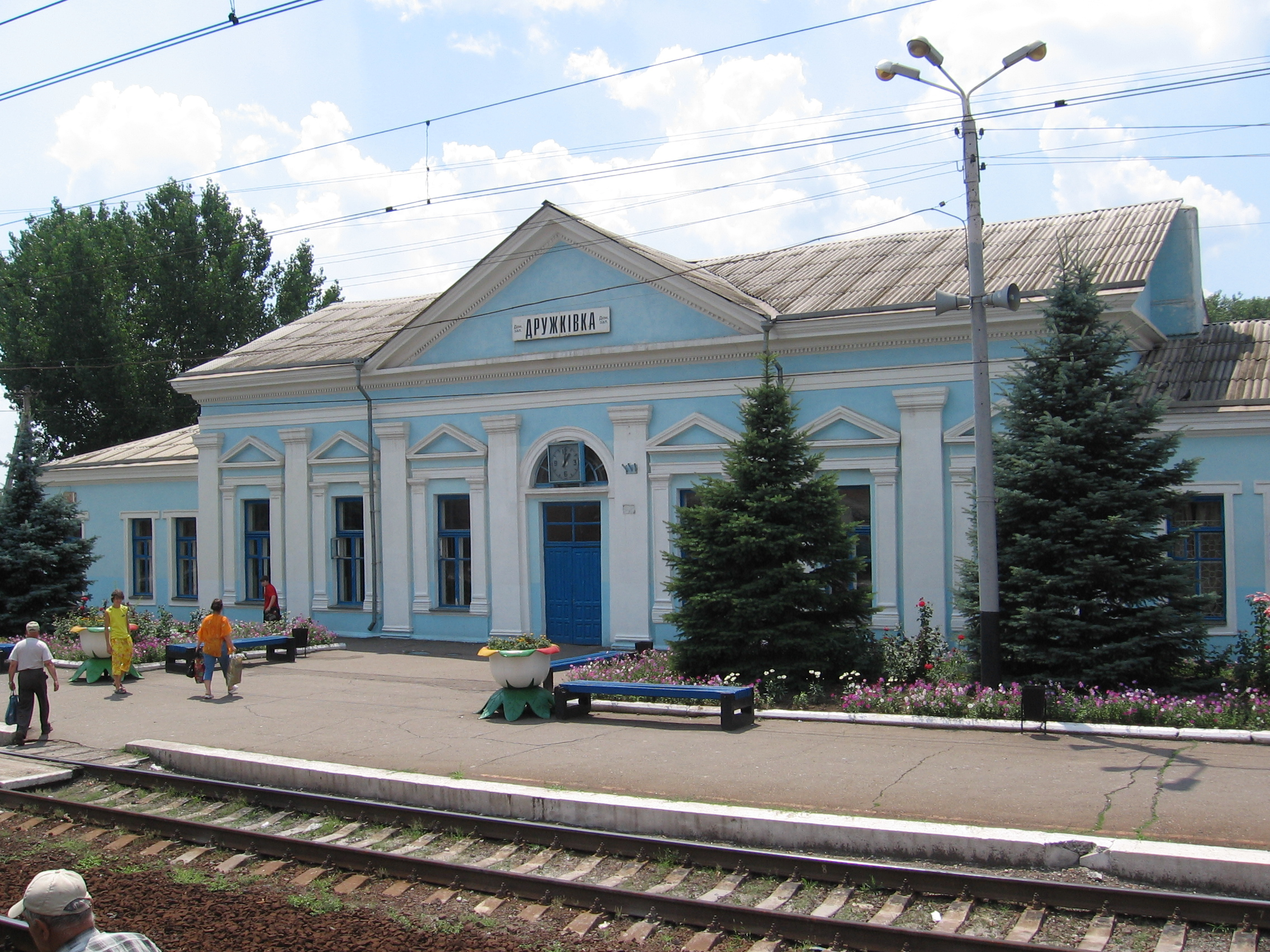 Фото